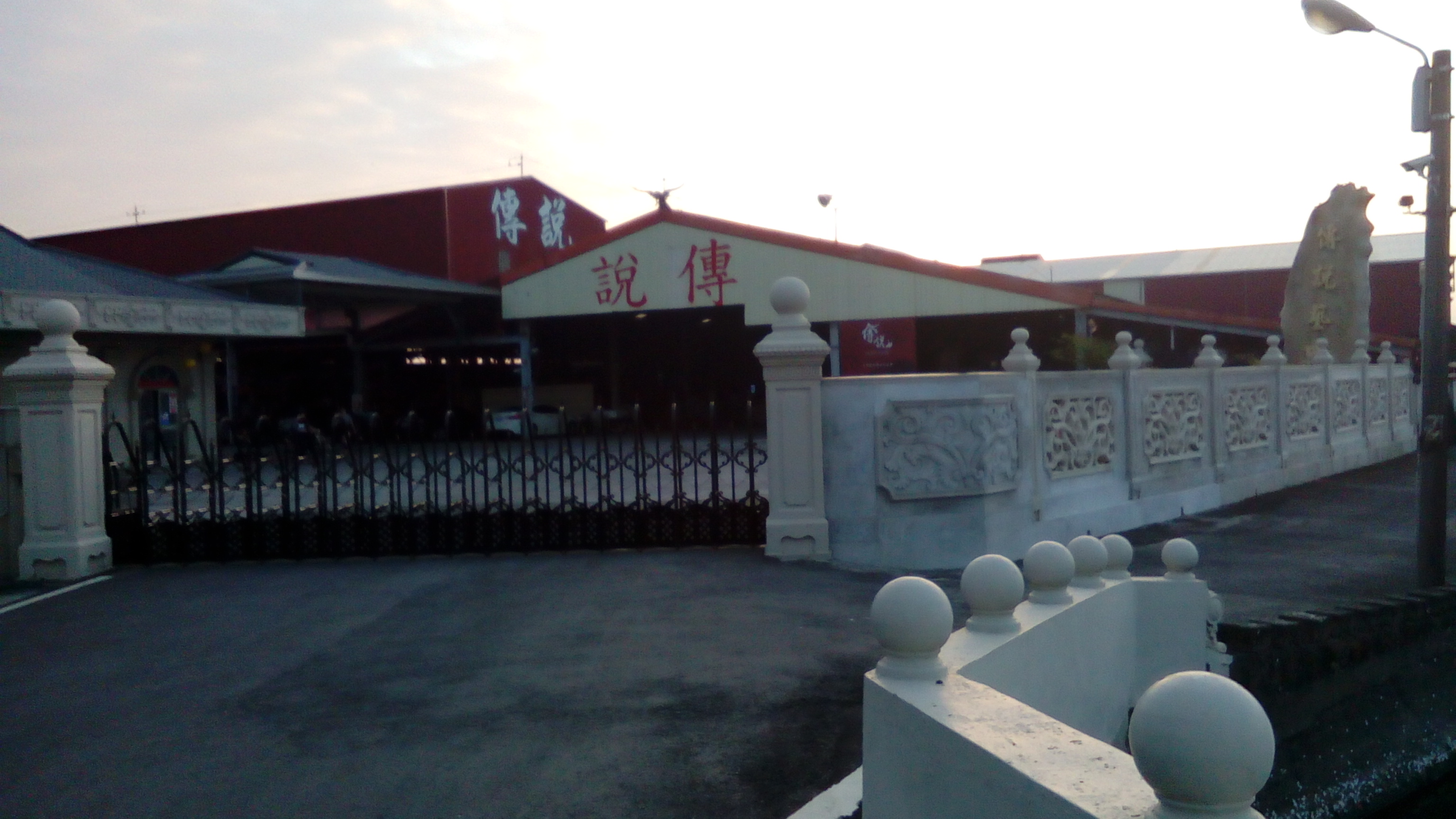 位於南州鄉中部 離市區約有2公里路程